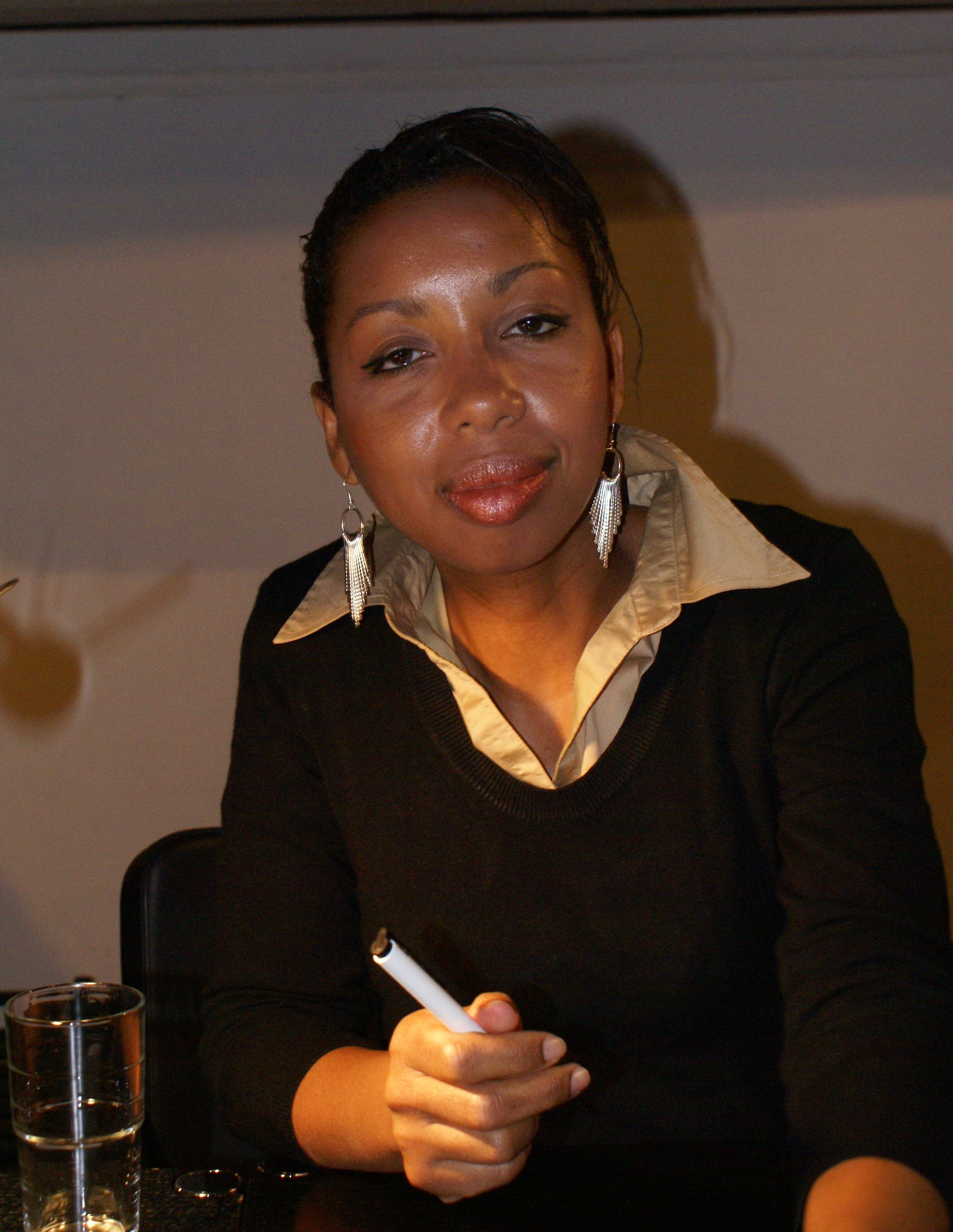 Marie NDiaye bei einer Lesung in Osnabrück im Juni 2009